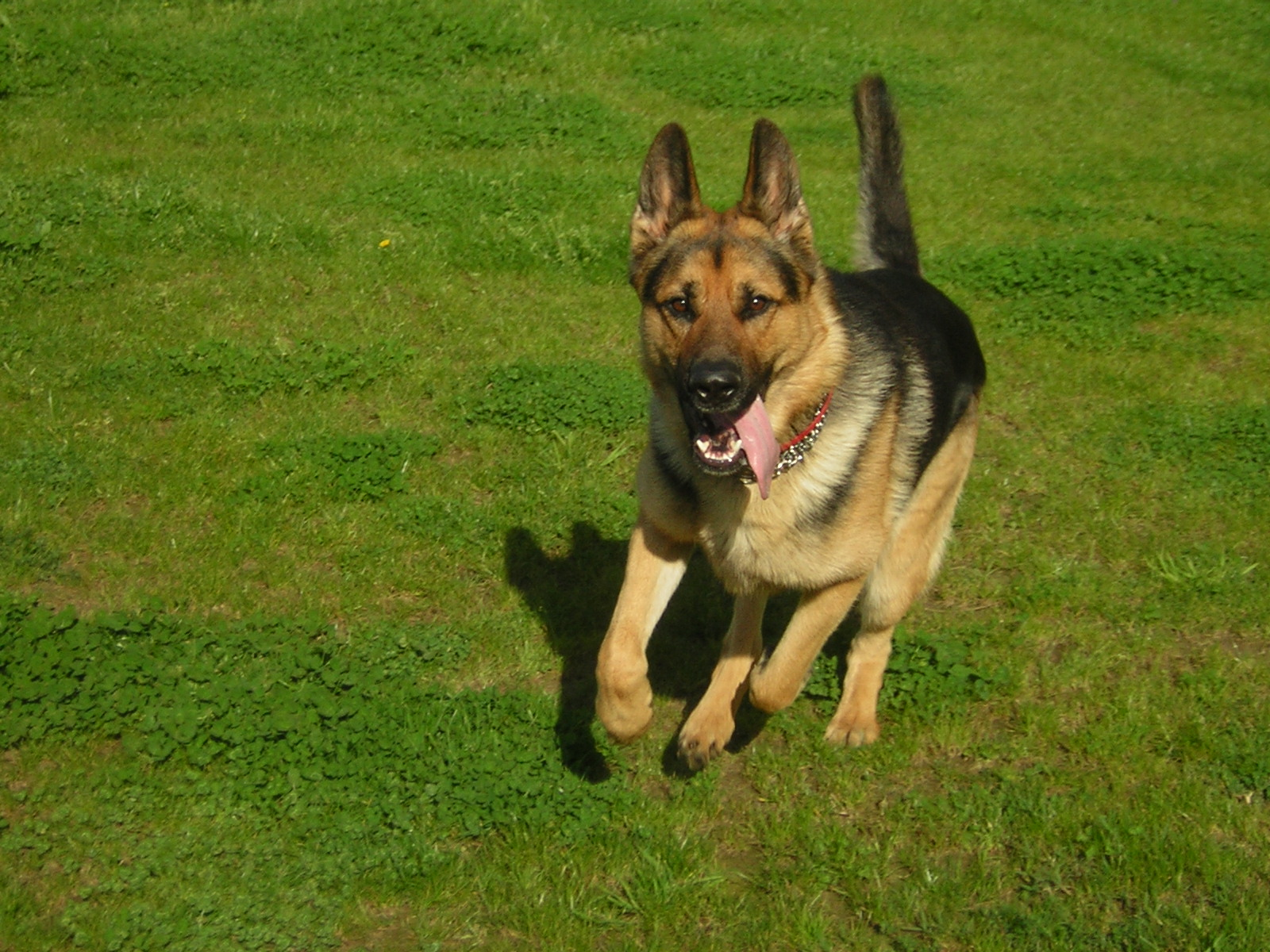 Fotografía tomada por min ao meu can na miña casa. Está tomada cunha cámara Nion 2200.